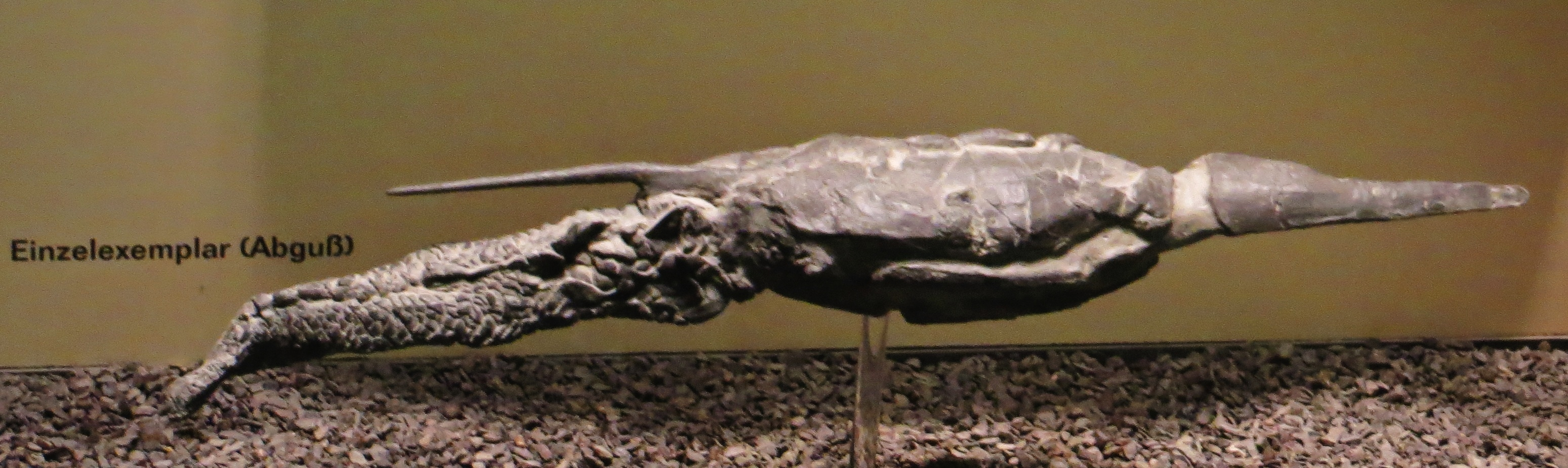 Took the picture at Senckenberg Museum, Frankfurt